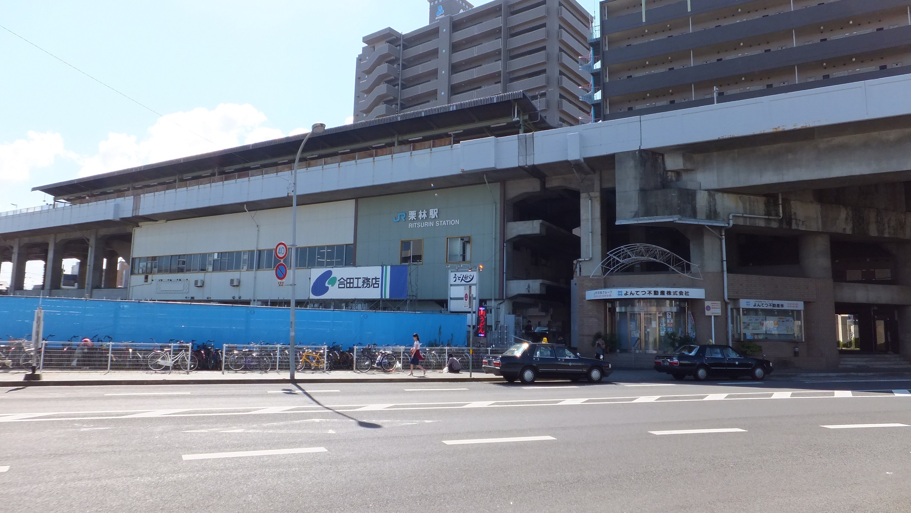 JR高徳線 栗林駅 駅隣接地にて藤塚町ホール建設中（香川県高松市 2015年）